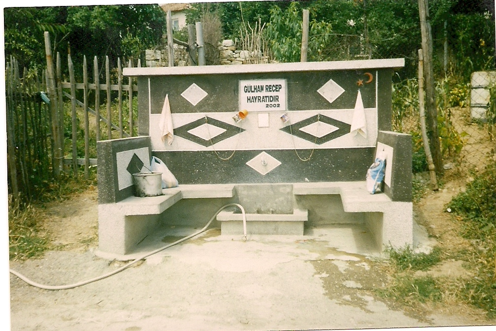 6706 Svobodinovo, Bulgaria